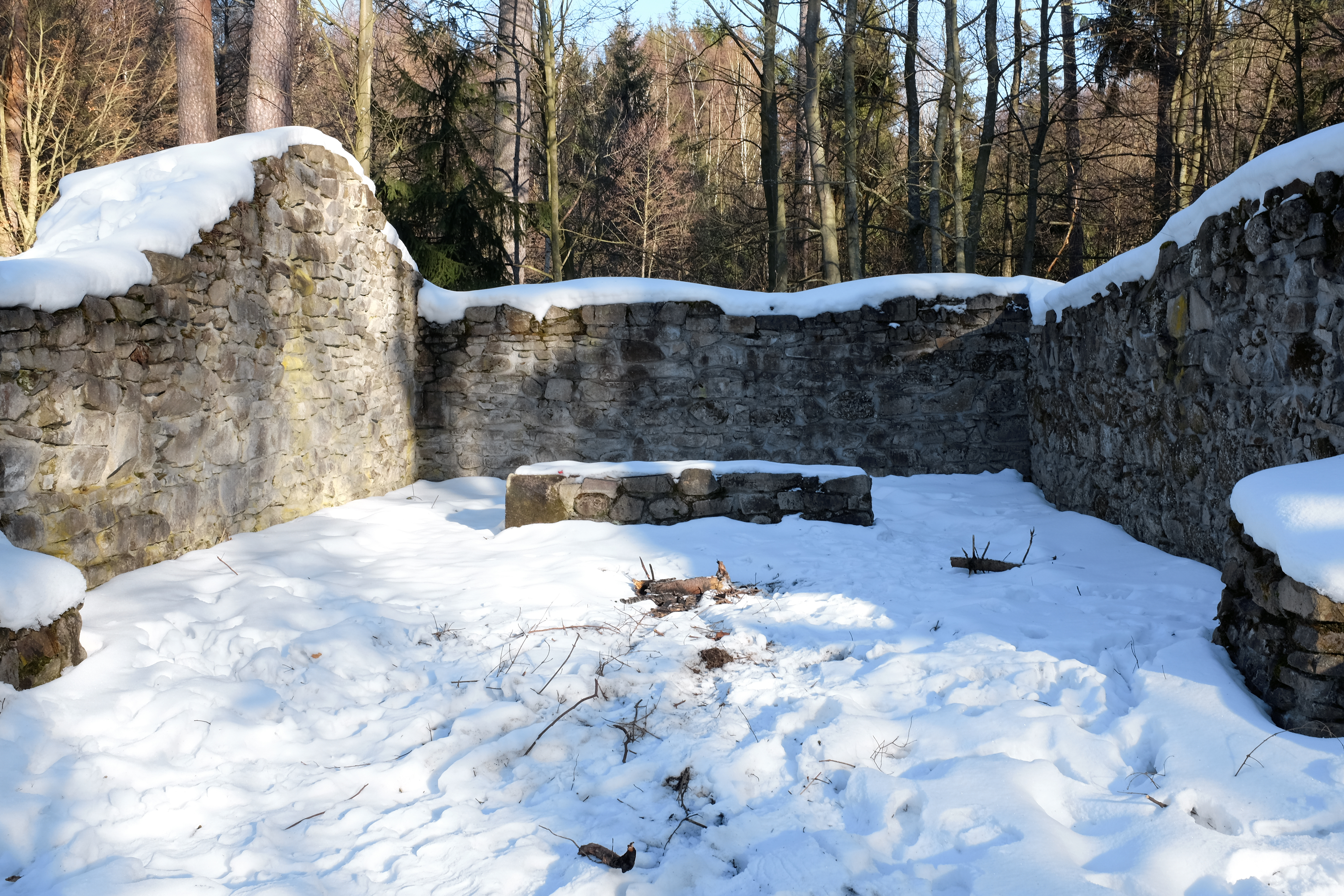 Kostel svatého Linharta, východně od obce Doubí, západně od Vrchu Přátelství, Karlovy Vary.